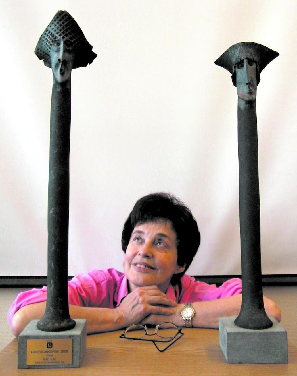 Den norske matematikeren, professor ved NTNU, Kari Hag mottok NTNUs likestillingspris i 2000